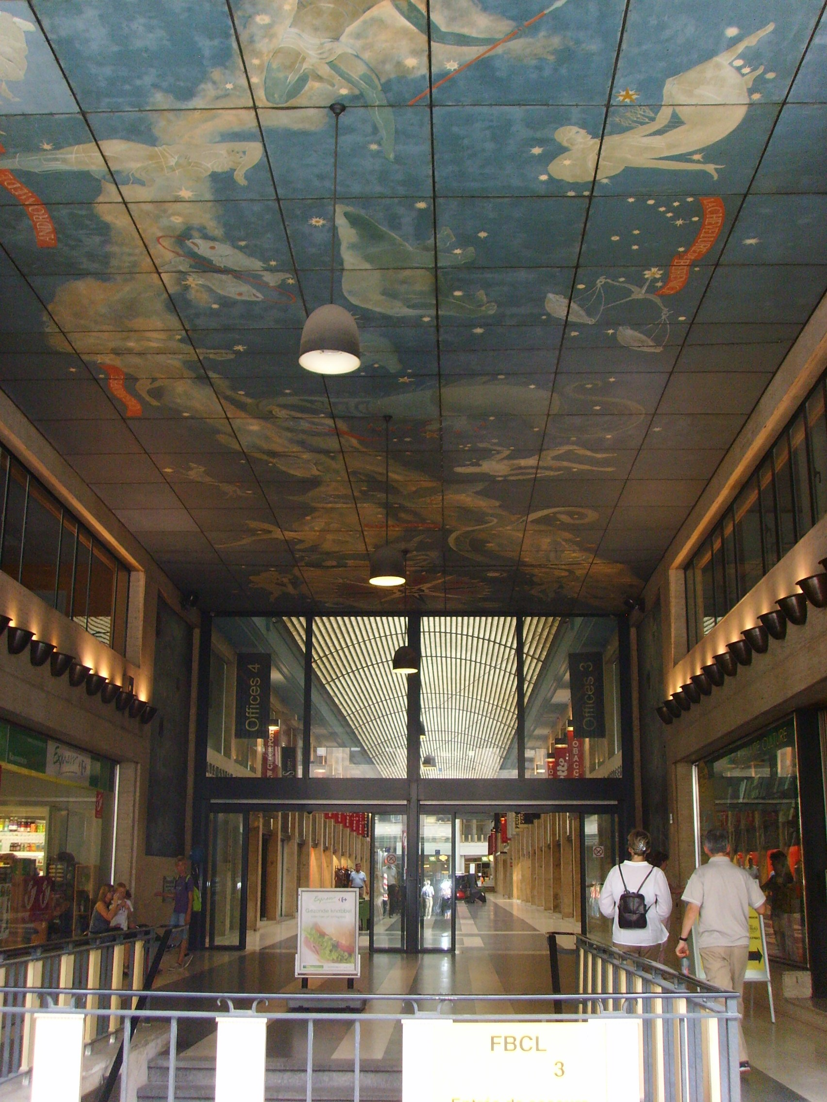 De entre van de Ravensteingalerij, met plafondschildering